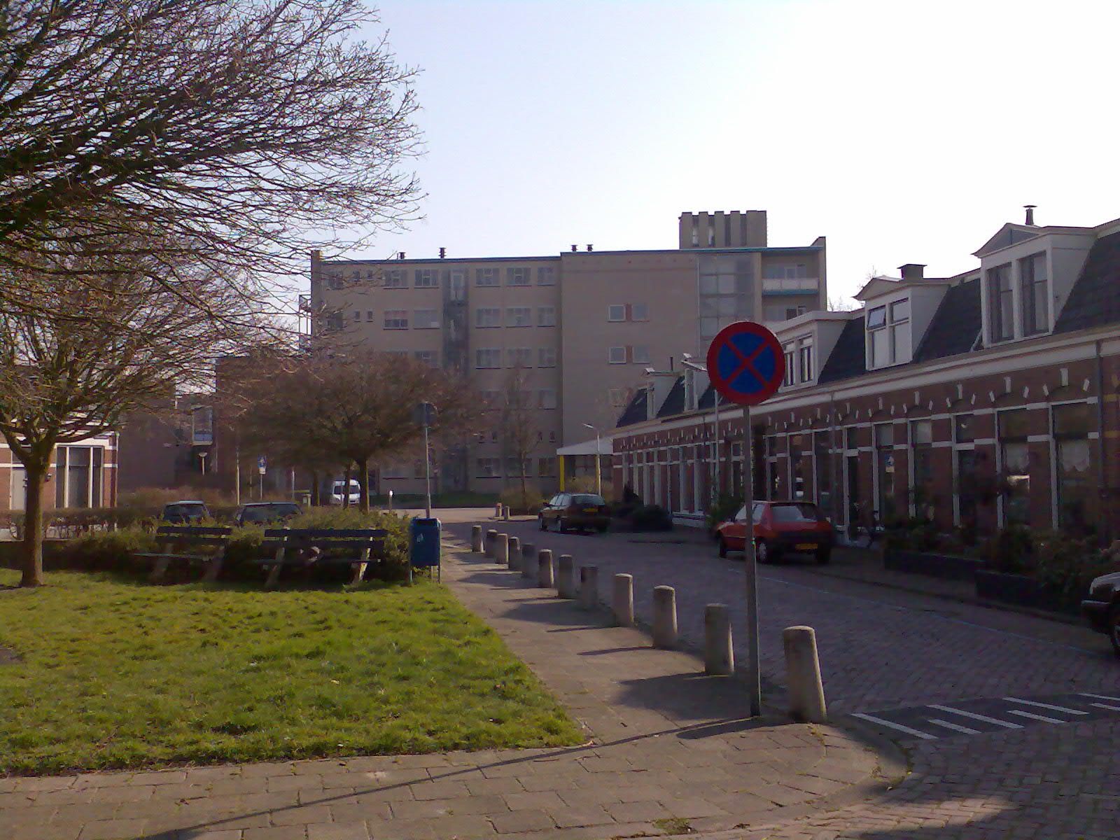 PD door eigen werk